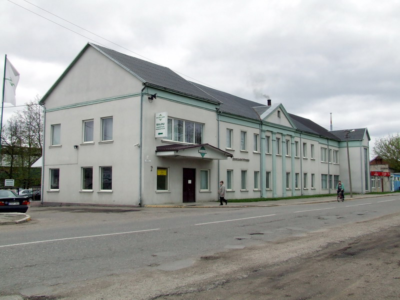 "Baldai jums", buvęs Jonavos baldų kombinatas